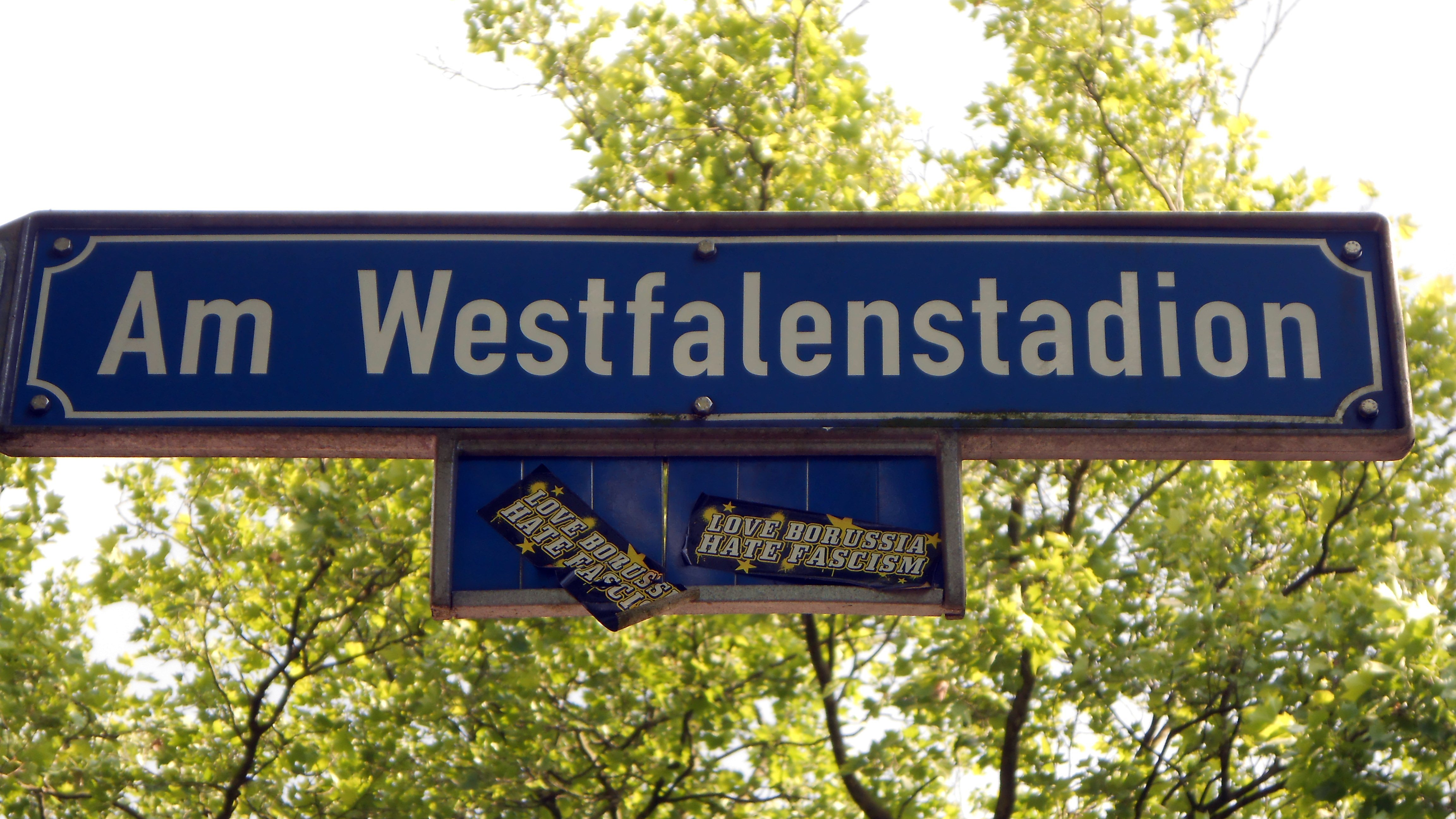 Straßenschild Am Westfalenstadion, eine kleine Verbindungsstraße zwischen Wittekindstraße und dem Westfalenstadion, aktuell Signal-Iduna-Park.